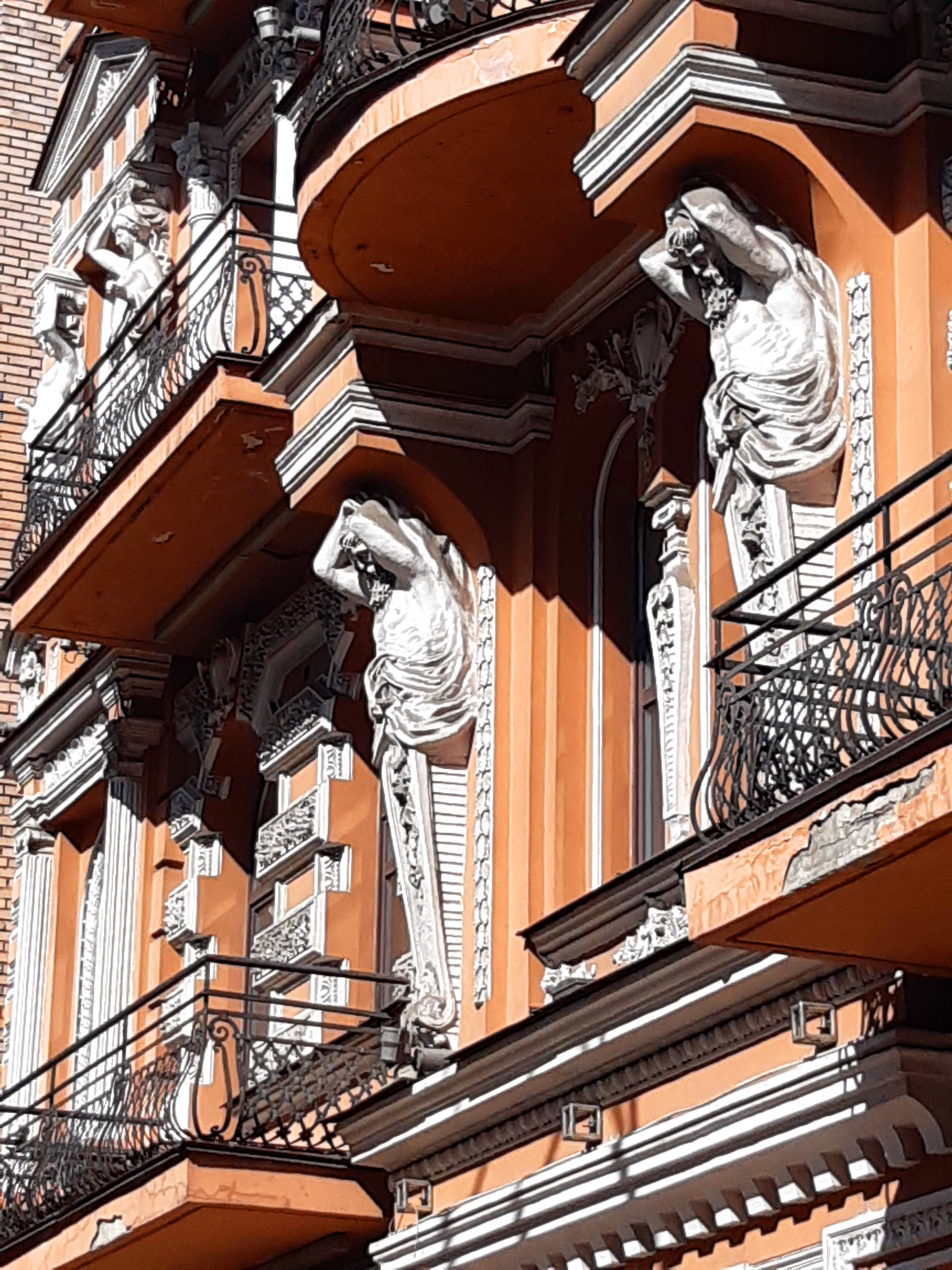 Атланти Будинок Клуга, вул. Саксаганського, 96, Київ